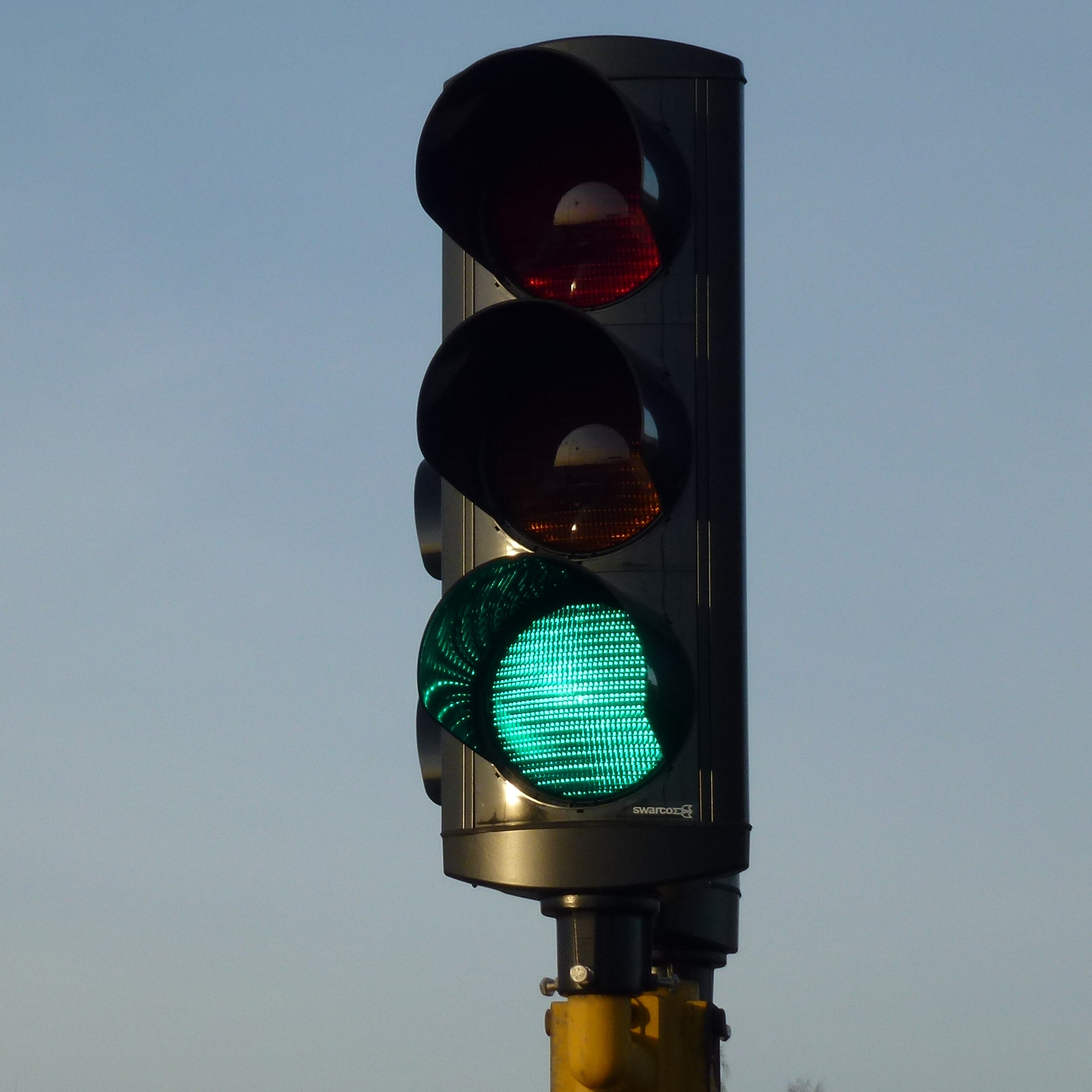 Trafiksignal grönt